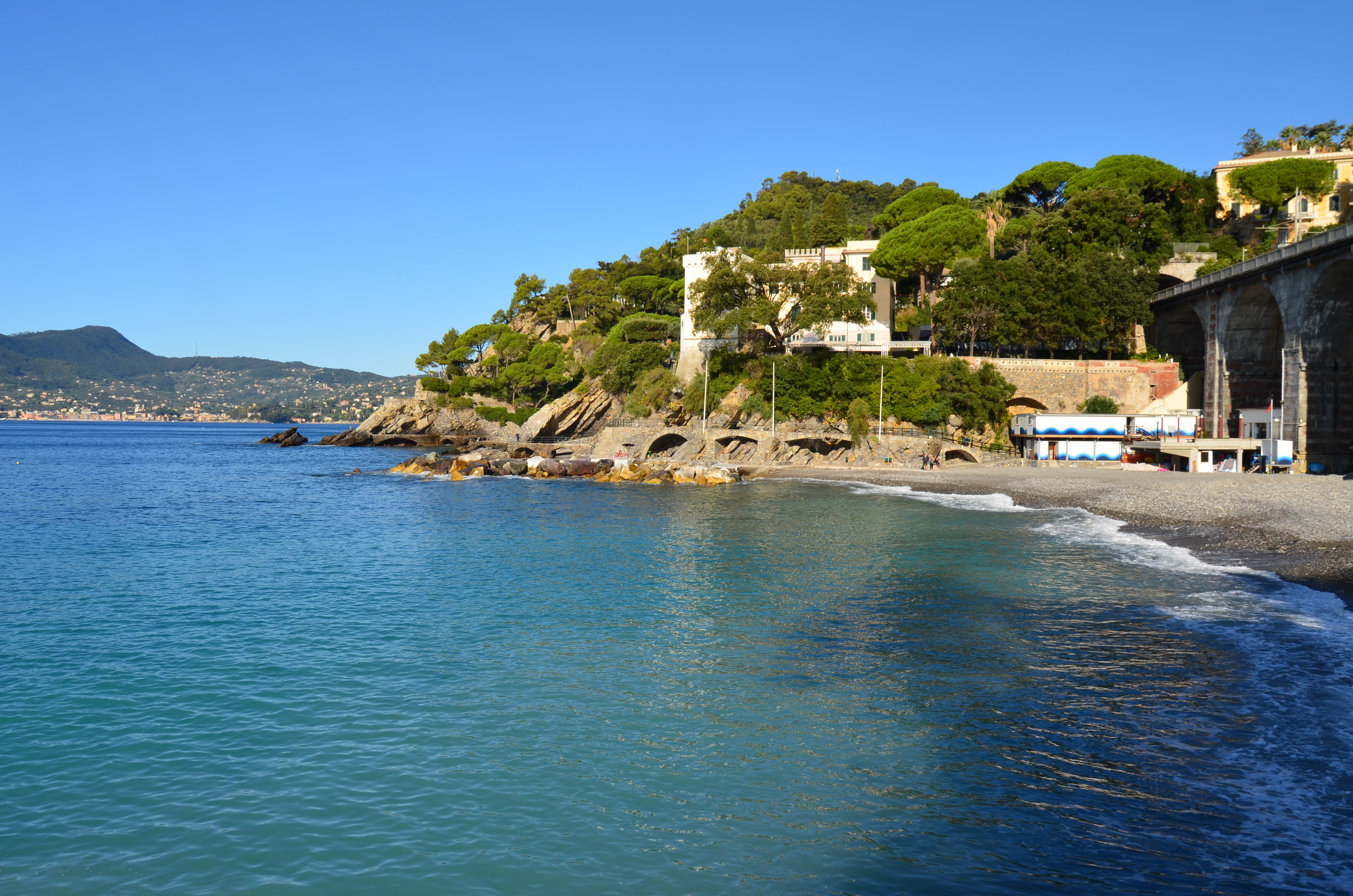 Il Castello Canevaro, Zoagli, Liguria, Italia